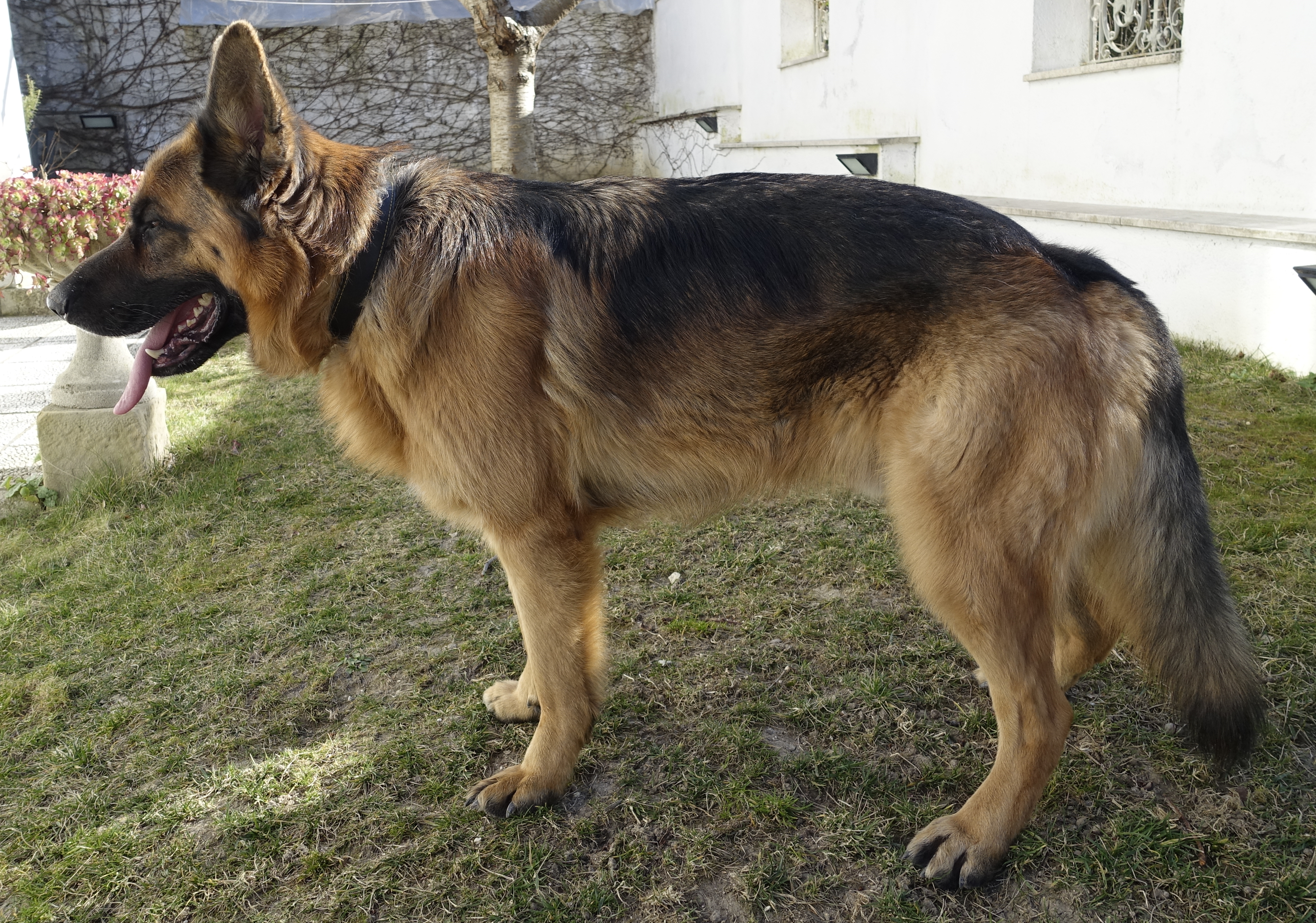 Pastore tedesco di 3 anni